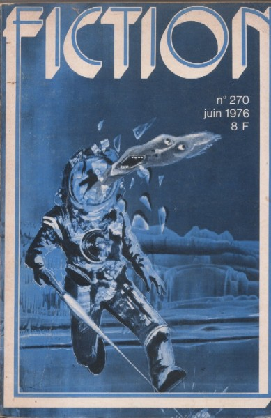 Illustration de couverture du Fiction n°270